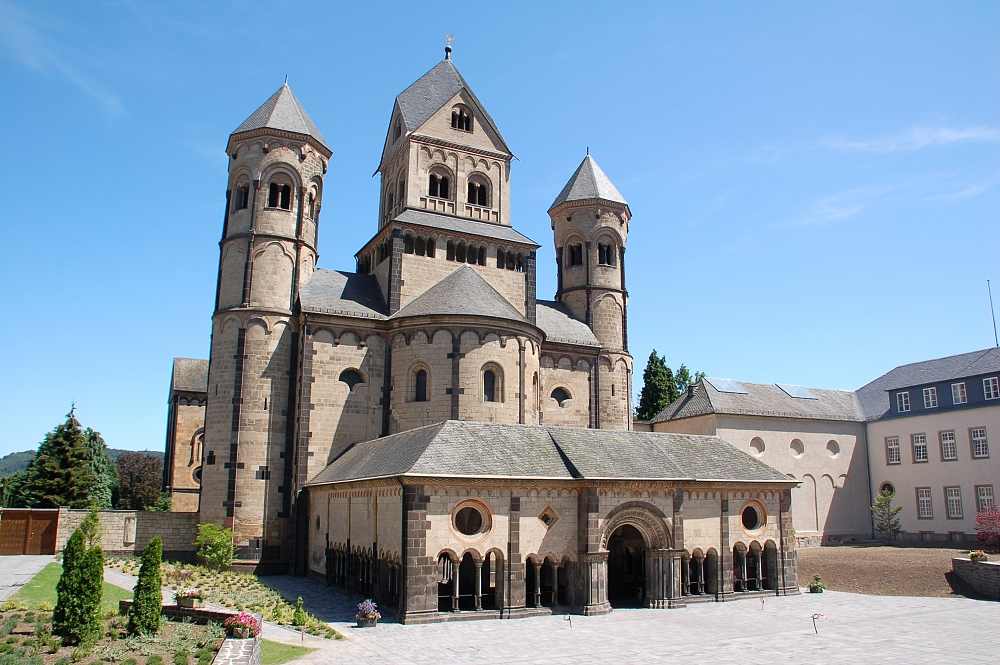 Maria Laach, Eifel, Germany